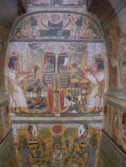 Détail du décor de la cuve d'un sarcophage trouvé à Thèbes - XXe dynastie égyptienne - Museo Gregoriano du Vatican - Rome